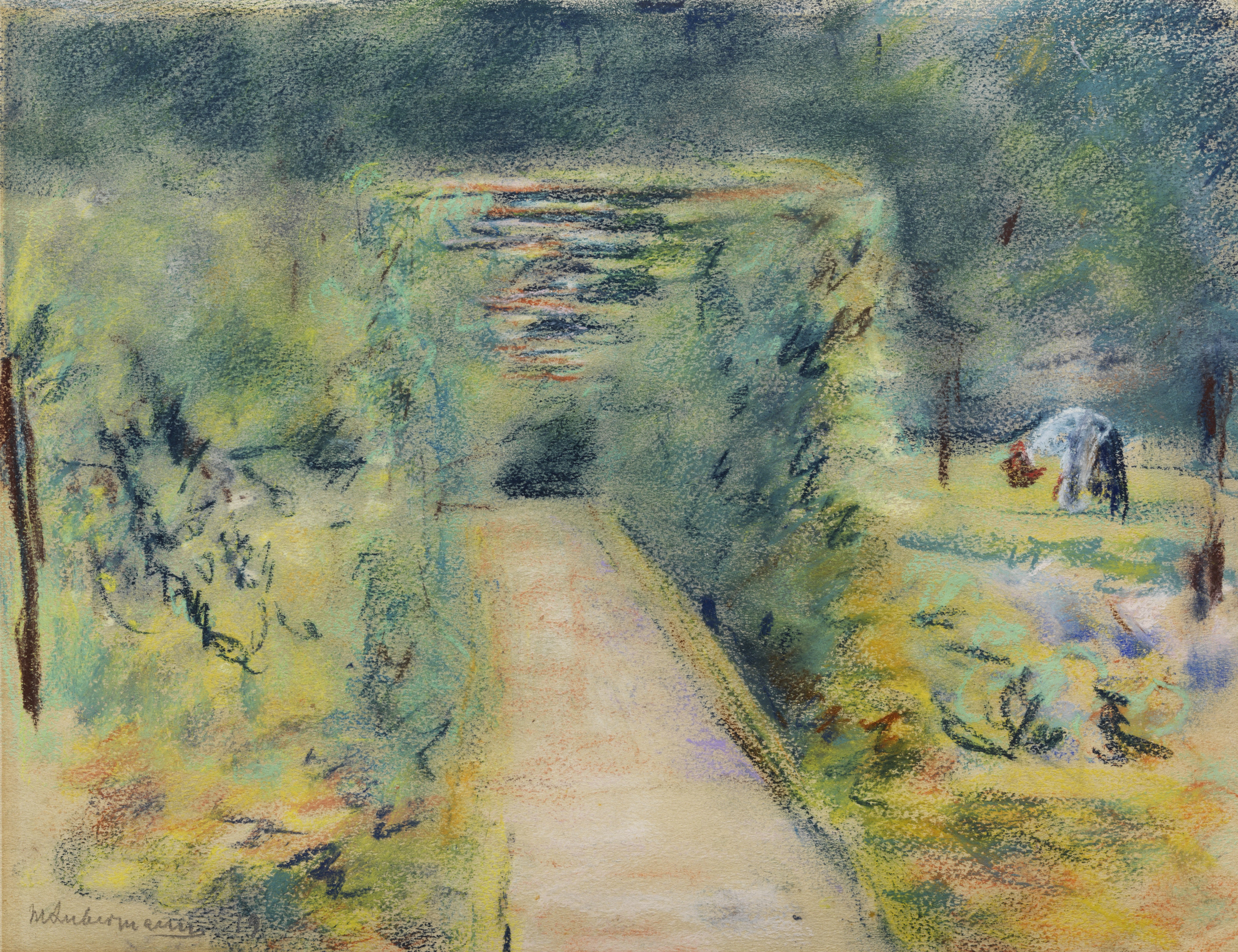 Provenienz: Auktion Villa Grisebach, 5. Juni 1993, Lot 275.